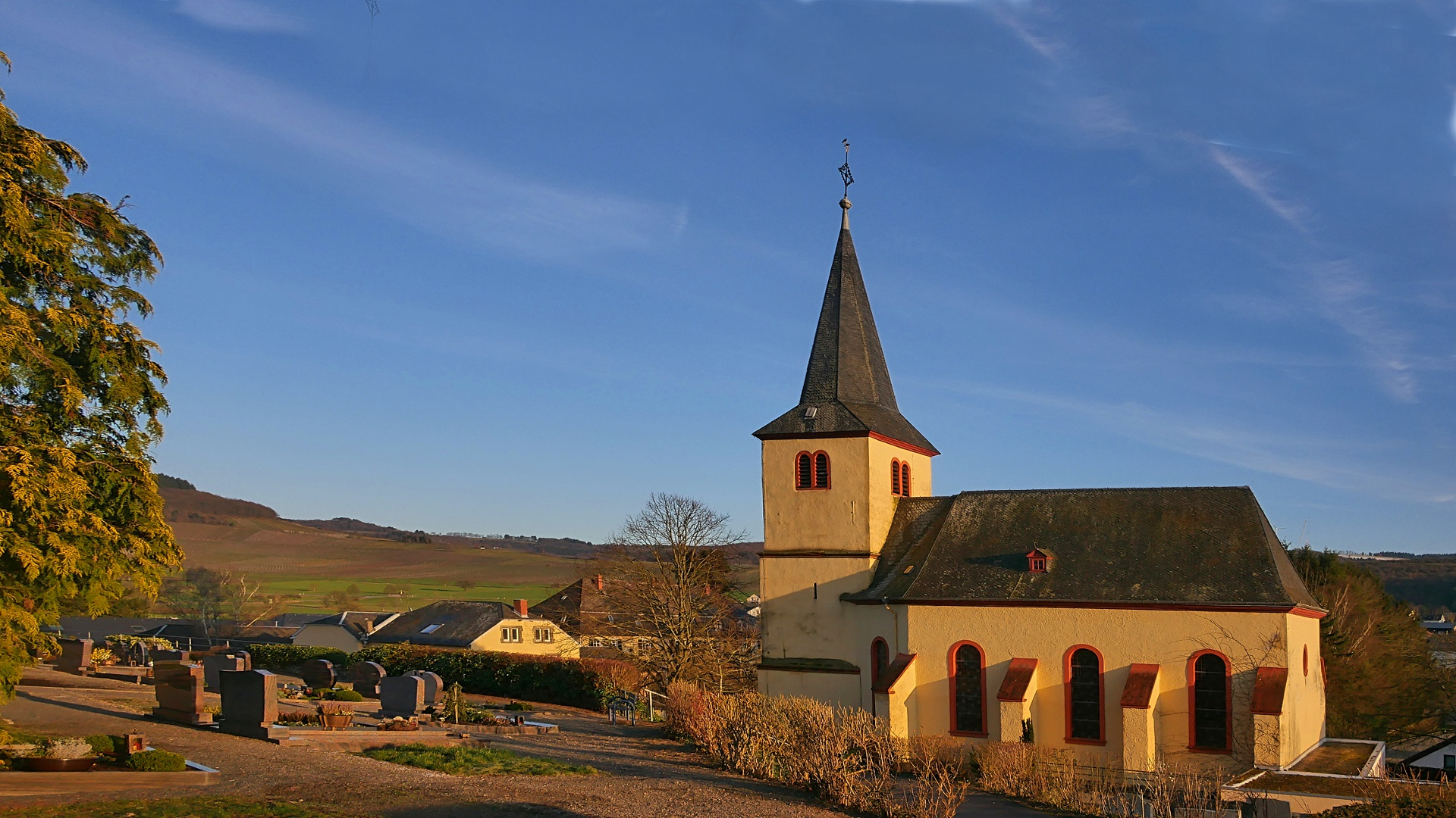 Friedhofskapelle und ehemalige Pfarrkirche St. Briktius, Konz-Oberemmel (Germany)